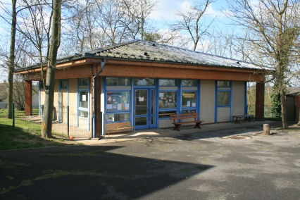 Ecole maternelle de Chalifert